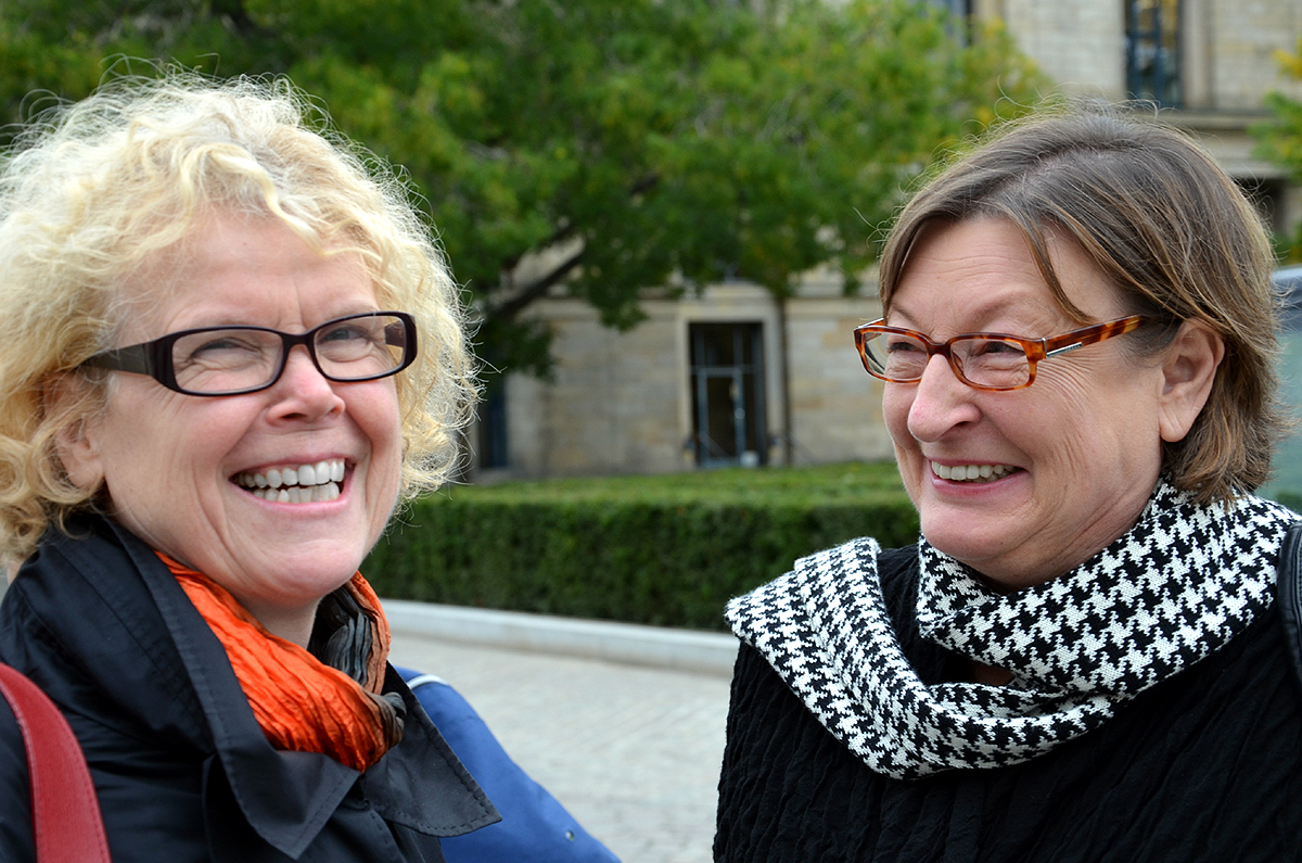 Carola Schelle-Wolff, Leiterin der Stadtbibliothek Hannover (und ebenfalls zuständig für das Stadtarchiv, den Fachbereich Museen mit seinen drei städtischen Museen sowie dem Kulturbüro der niedersächischen Landeshauptstadt), sowie die Kultur- und Schuldezernentin, Stadträtin Marlis Drevermann ...